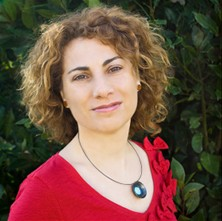 Candidata de EQUO Asturias a las elecciones de 2011 y 2012